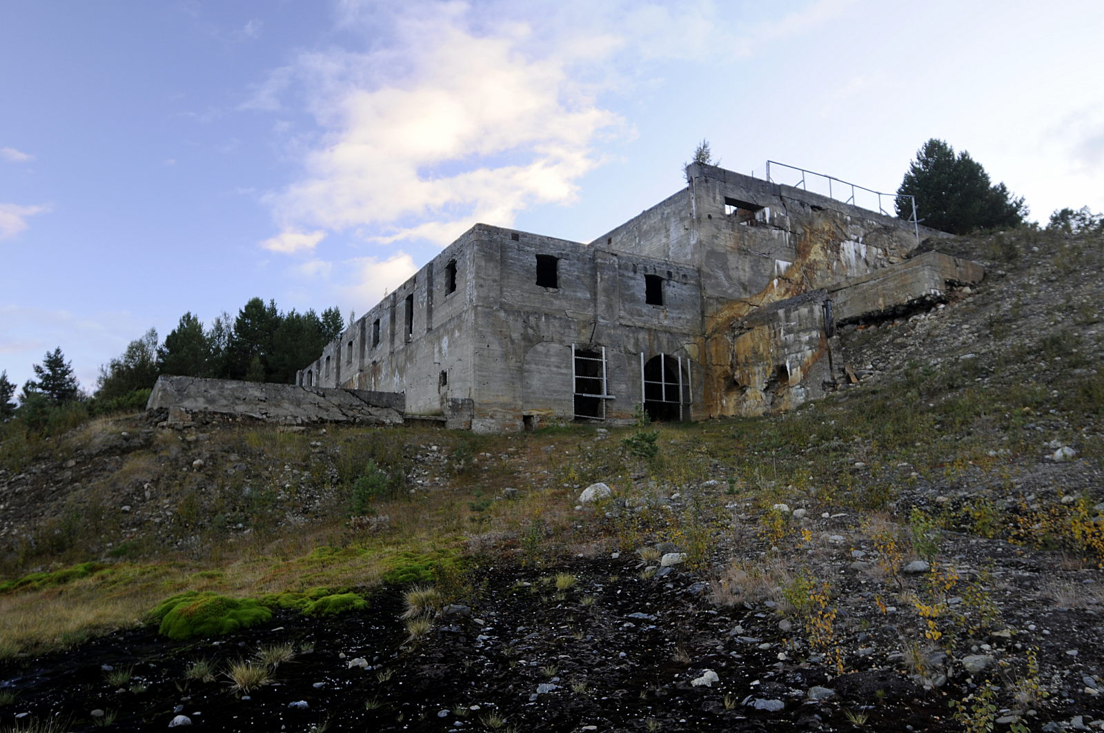 Rester etter vaskeriet ved Røstvangen gruver